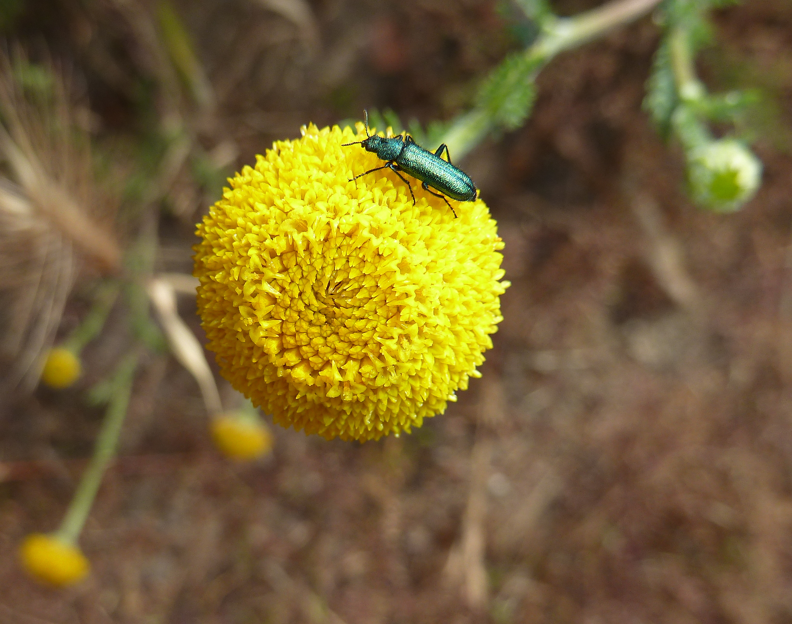 Anacyclus valentinus (magarza valenciana) - Capítulo, vista cenital con Psilothrix viridicaerulus - Carretera de San Isidro (CV-909), Albatera (Alicante, España).